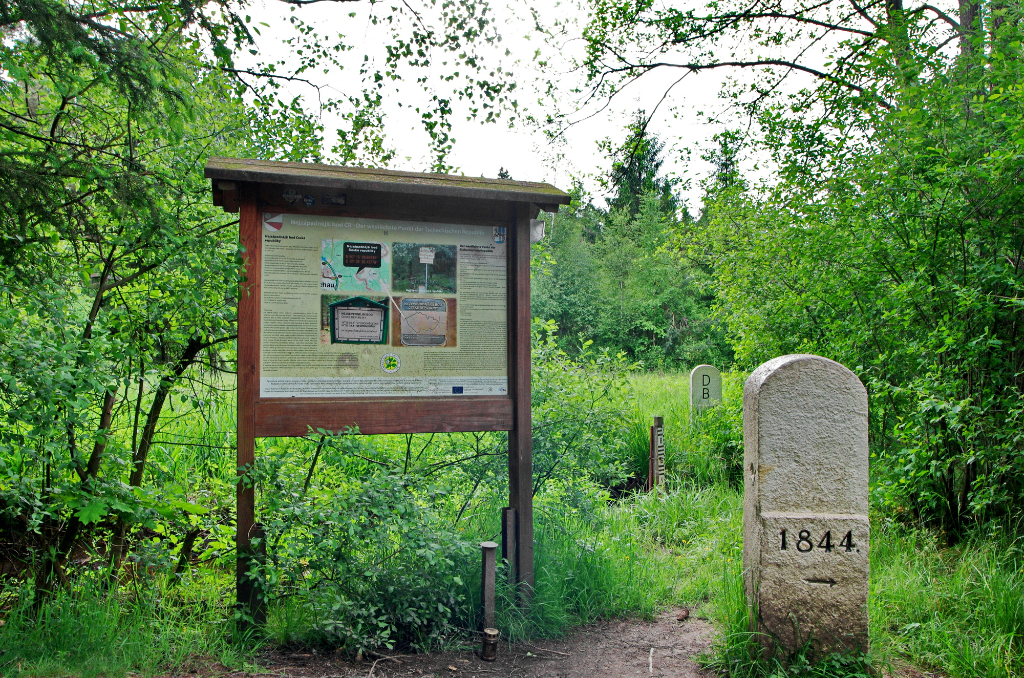 Nejzápadnější bod Česka, u zaniklé osady Újezd, Ašský výběžek, okres Cheb